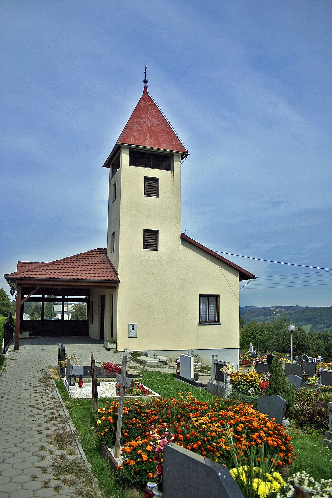 l